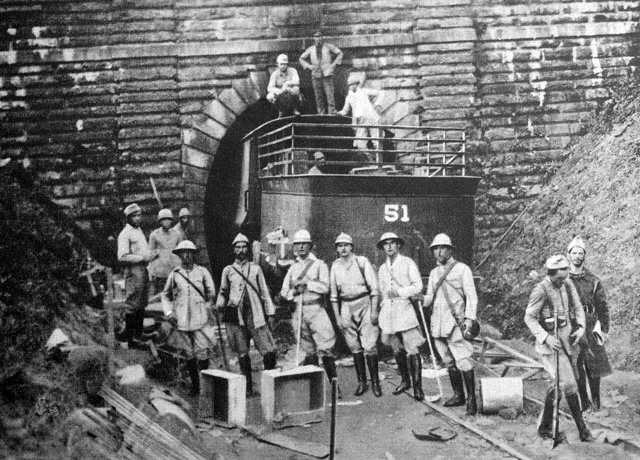 Soldados mineiros após a tomada do Túnel da Mantiqueira na divisa entre São Paulo e Minas Gerais.